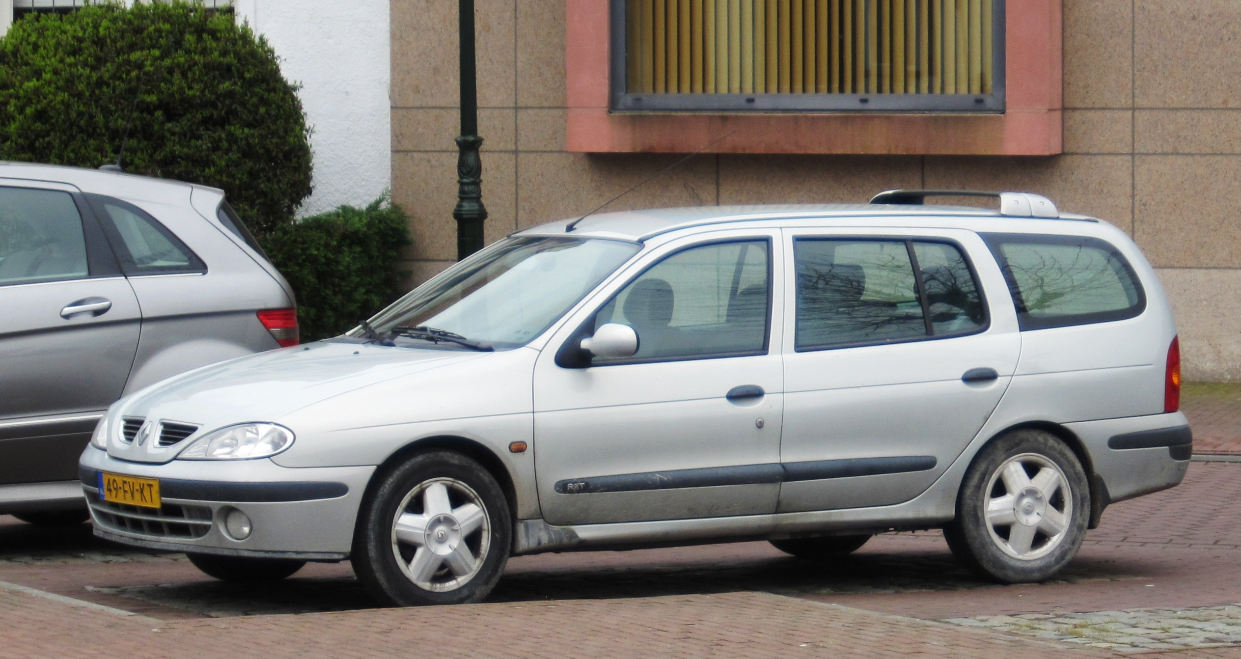 Renault Megane break (ca 2000), Aardenburg